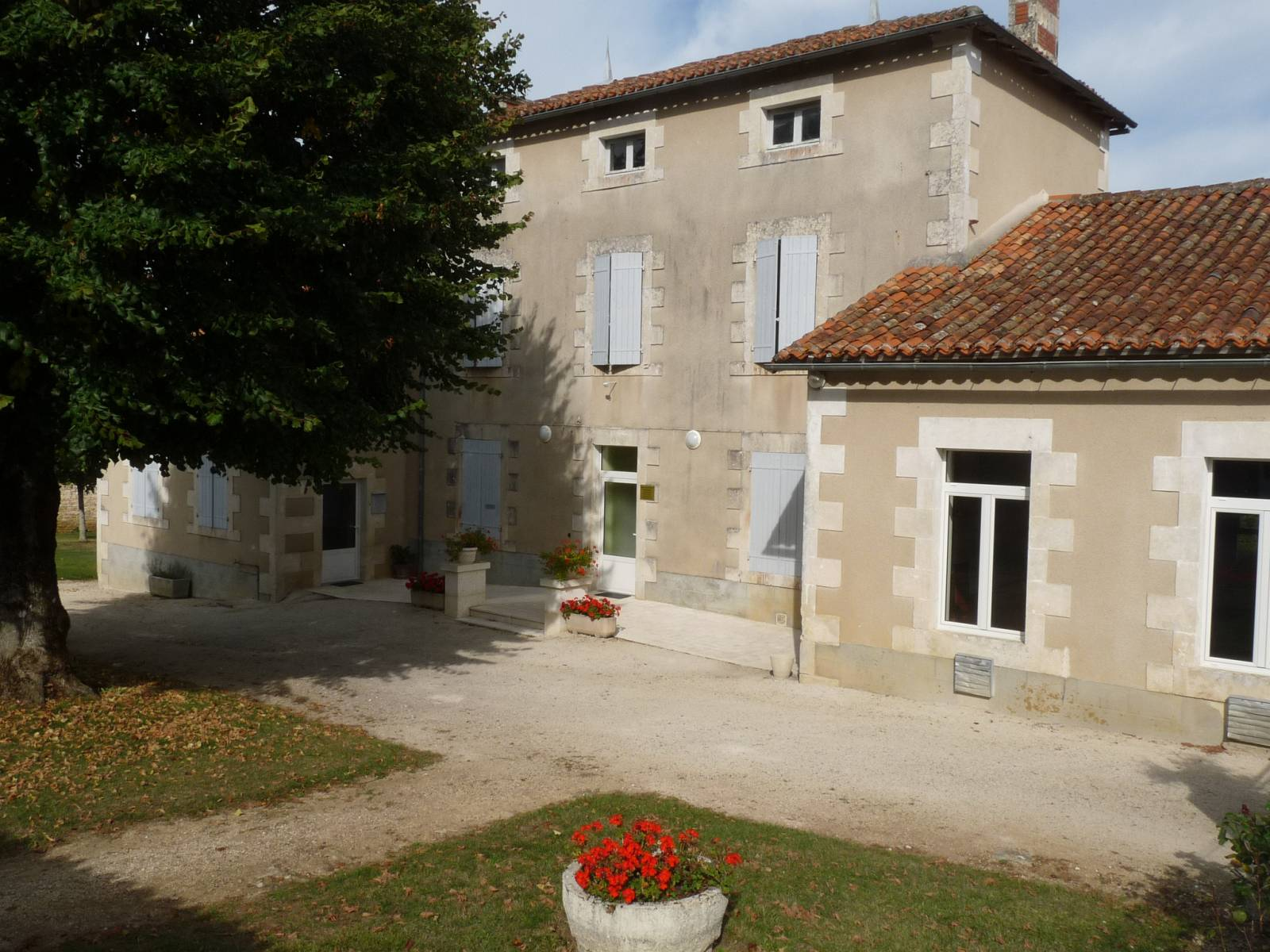 mairie de Poursac, Charente, France